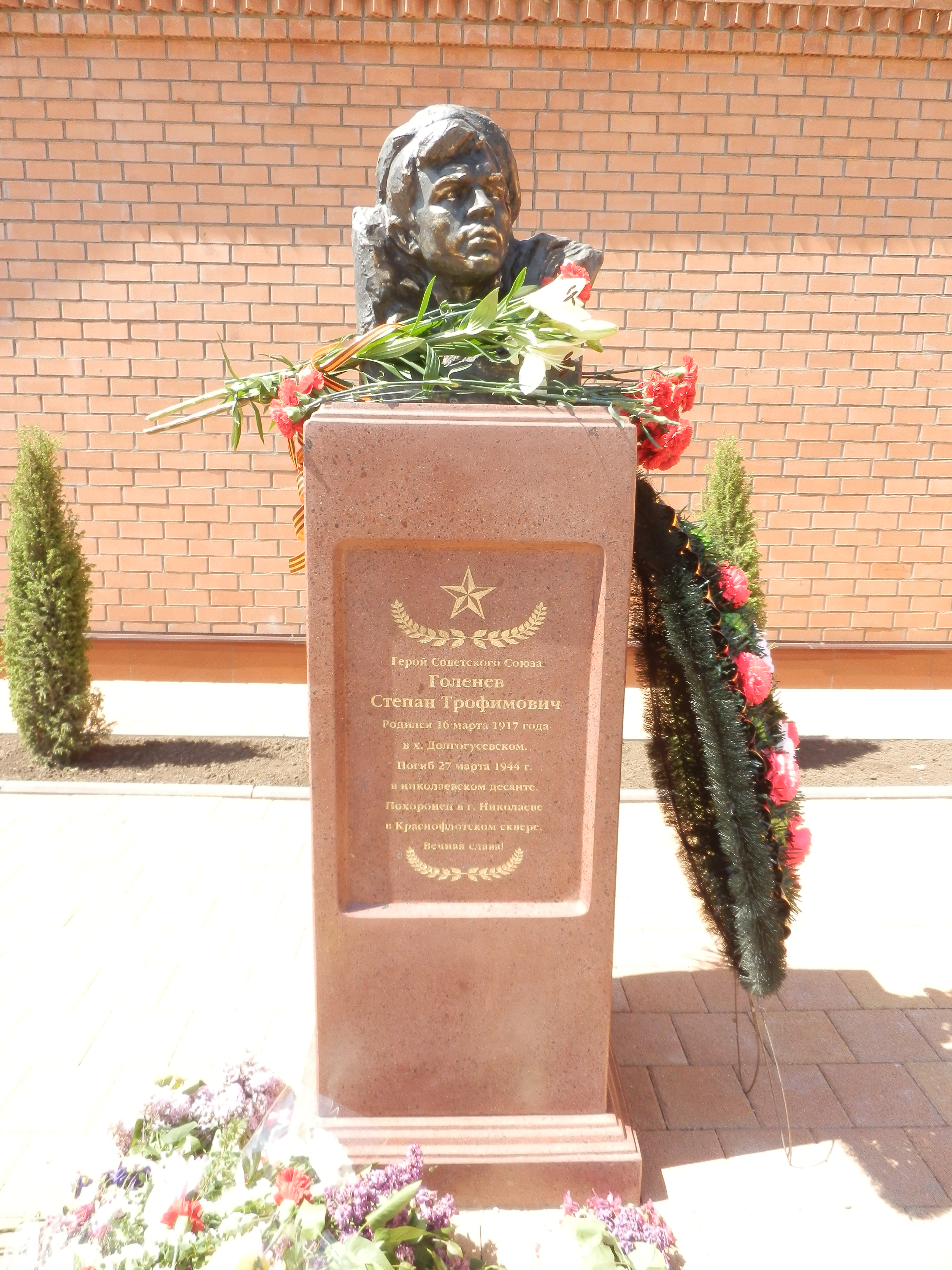 Бюст Героя Советского Союза Степана Трофимовича Голенева, открытый 9 мая 2015 года в хуторе Долгогусевском, Краснодарский край.